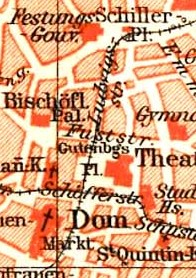 Stadtplan (Umgebung) von Mainz, hier Ludwigsstraße (Mainz)